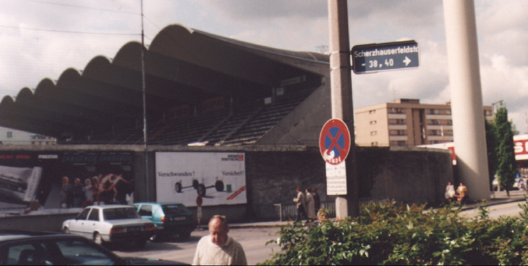 Die Westtribüne des Lehener Stadions von Norden aus gesehen (1984)